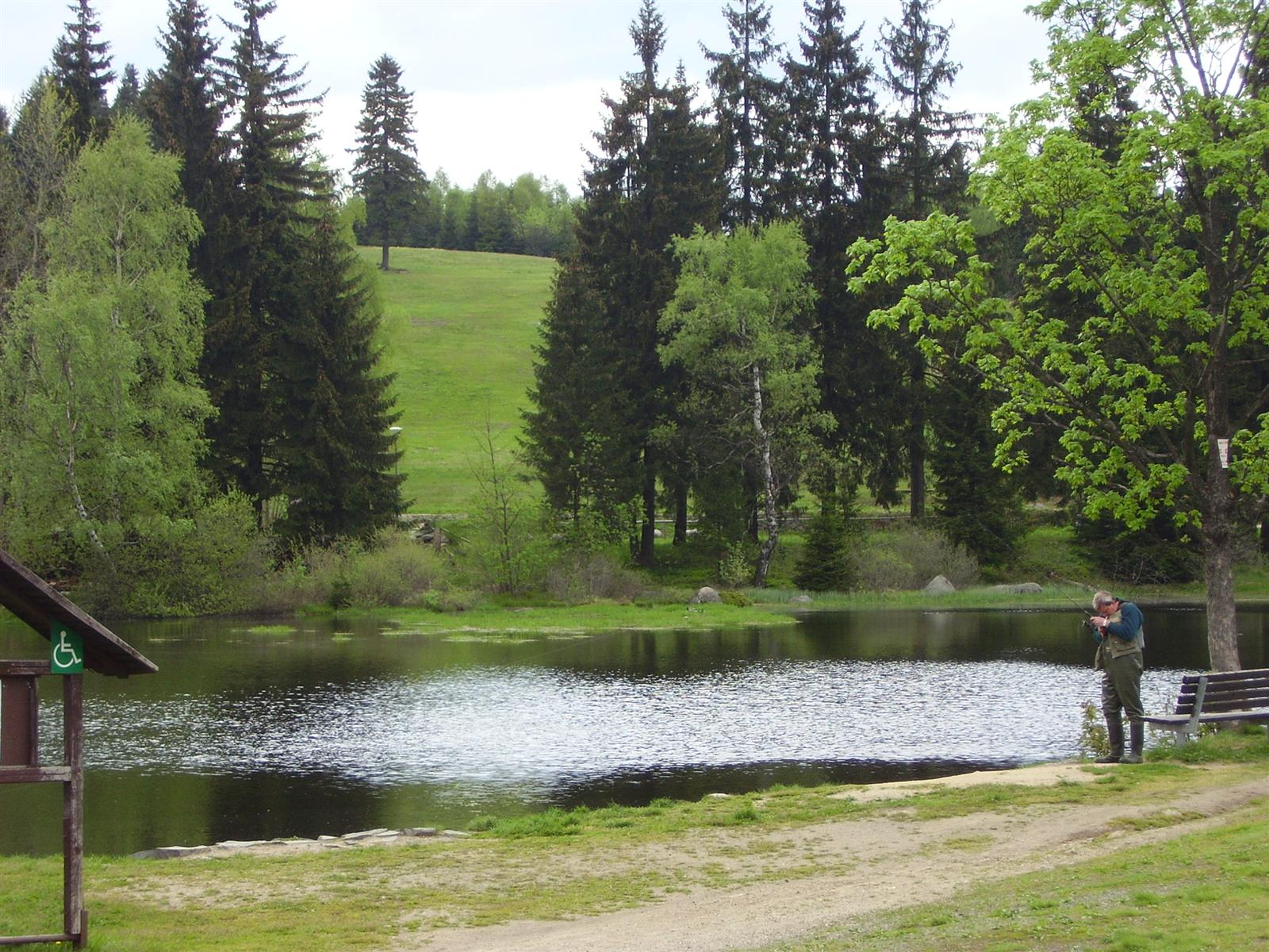 Rybník v Bedřichově v Jizerských horách u autobusové stanice